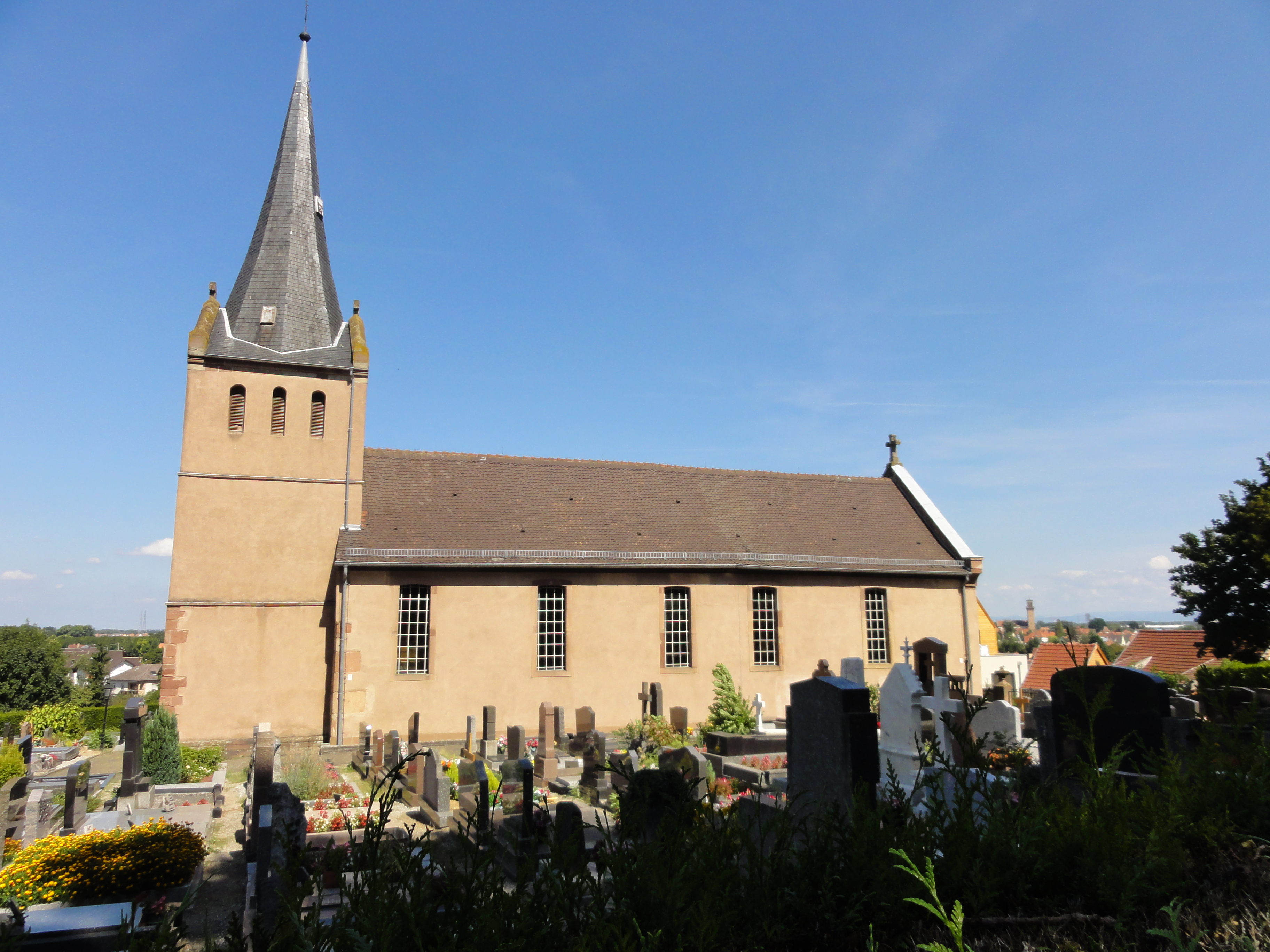 Alsace, Bas-Rhin, Église protestante de Mundolsheim (PA00084810, IA67007261).